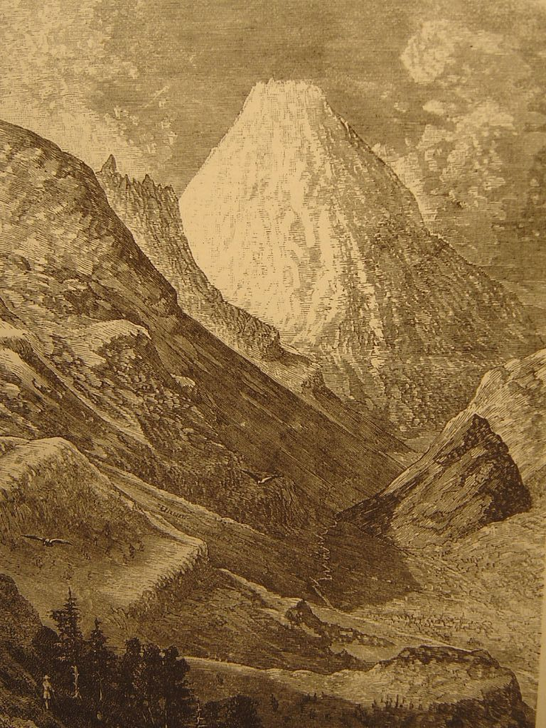 le pic du midi (Hautes Pyrenées par L.Hacault